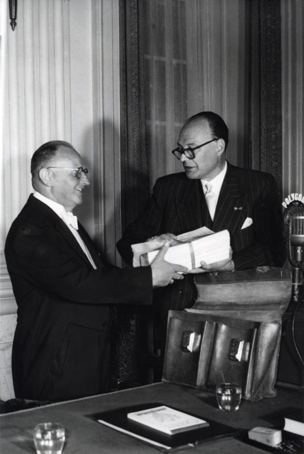 Prinsjesdag. Minister Hofstra van Financiën breekt met een traditie en presenteert de miljoenennota tot verbazing van de Tweede Kamer niet in het koffertje "derde dinsdag in september", maar in een gewone aktentas. Links de bode die de miljoenennota in ontvangst neemt. Nederland, Den Haag, 17 september 1957.